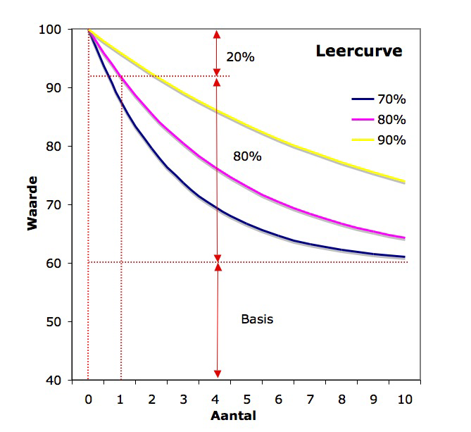 Weergave van een leercurve. Januari 2007 Laurens van Lieshout .